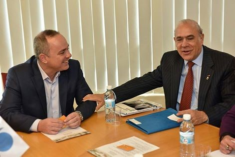 משרד רה"מ, ינואר 2016